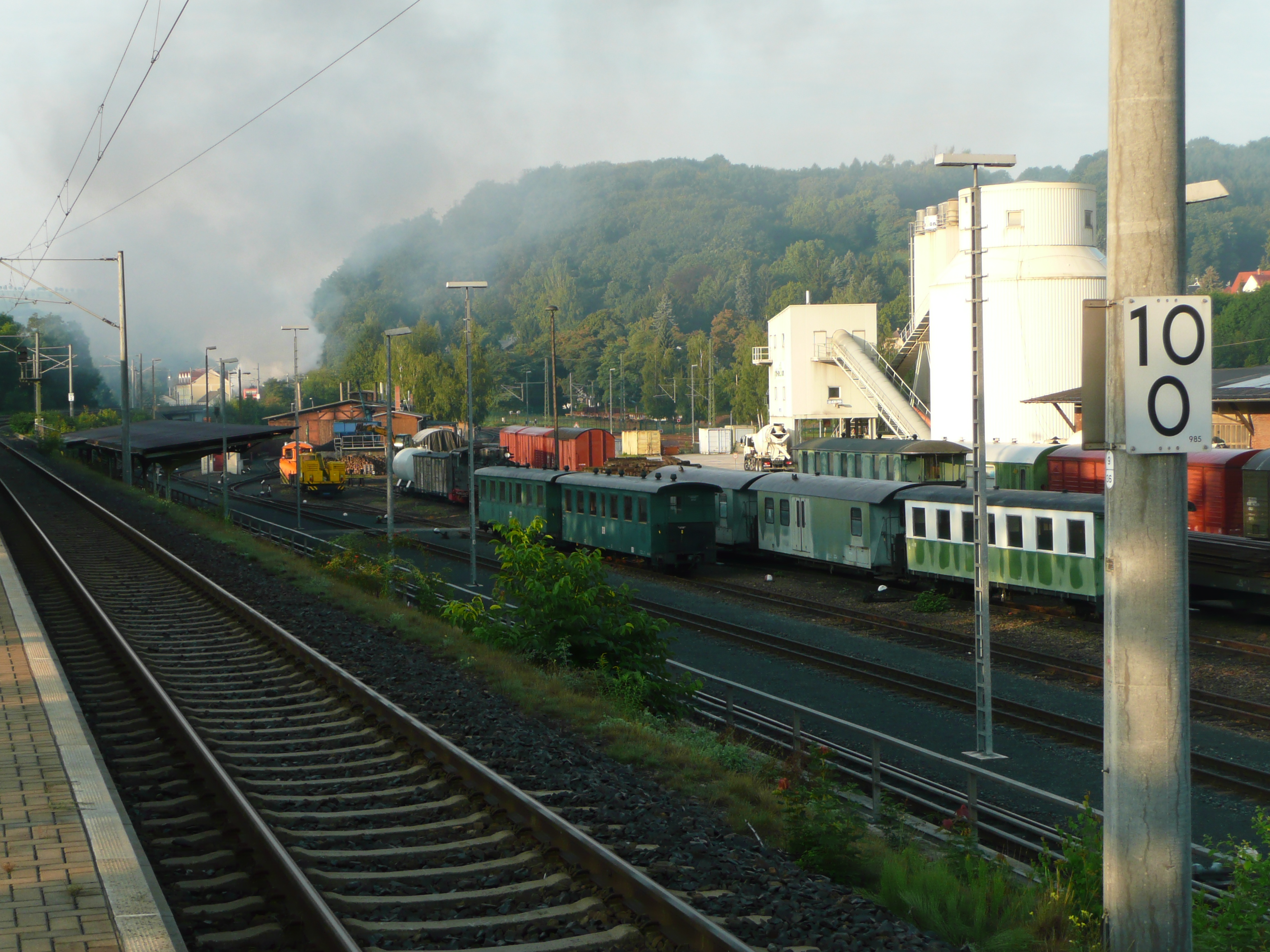 Schmalspuranlage des Bahnhofes Freital-Hainsberg Richtung Tharandt